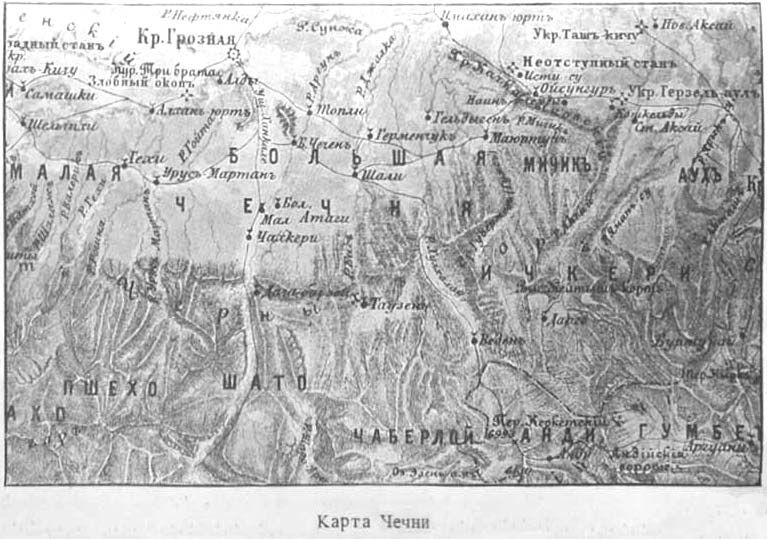 Старая карта Чечни